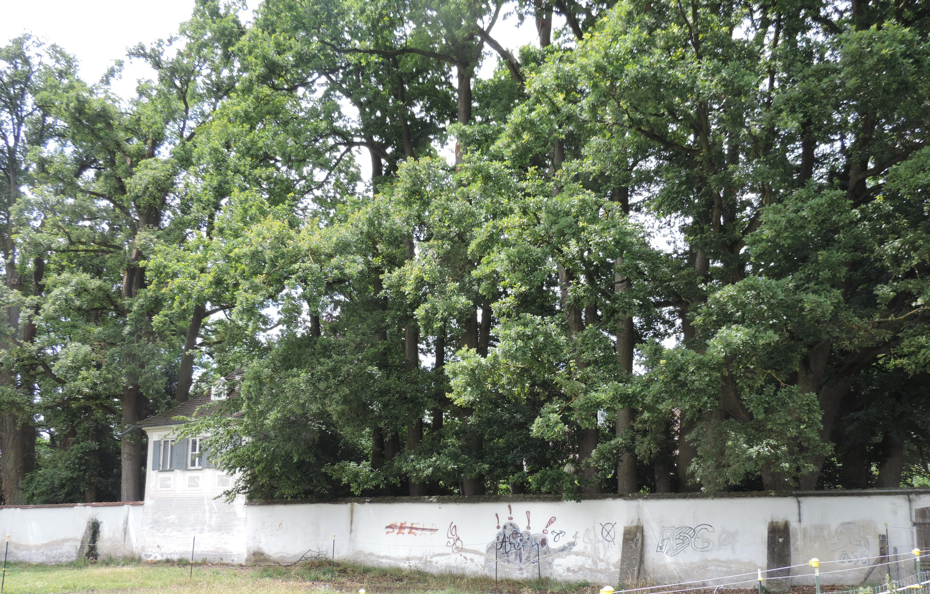 Östliche Schlossmauer mit Pavillon